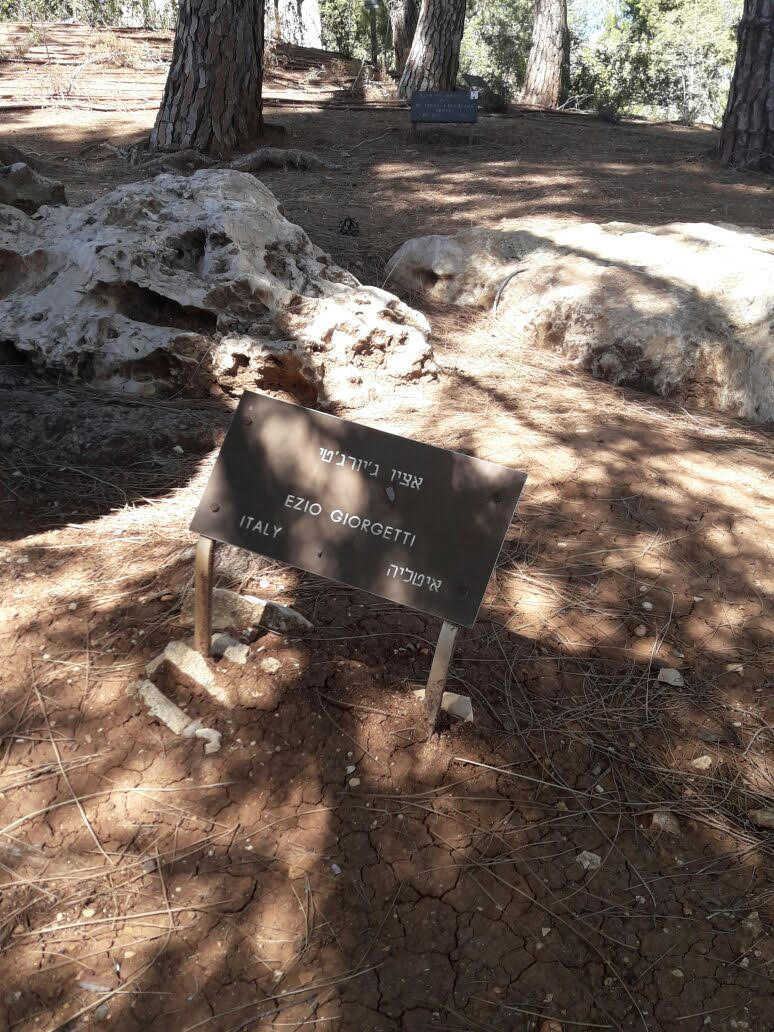 העץ שנטעו ביד ושם על שם אצ'יו ג'ורג'טי